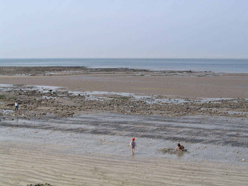 La plage, la Manche et la Seine à Villerville, en France